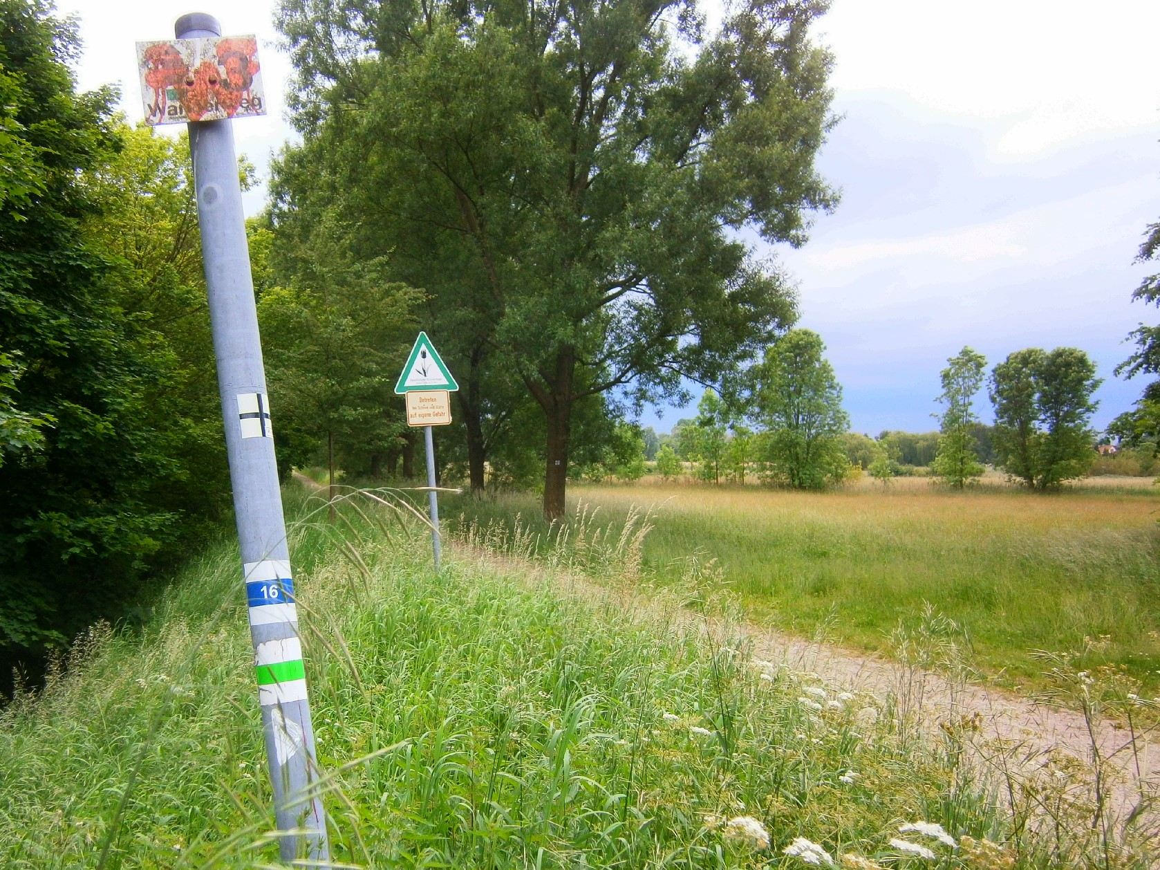 Der Barnimer Dörferweg ist ein Wanderweg im Noden Berlins und als Grüner Hauptweg 16 markiert. Hier Blick nach Süden im Ortsteil Stadtrandsiedlung Malchow vom Märchenweg aus.